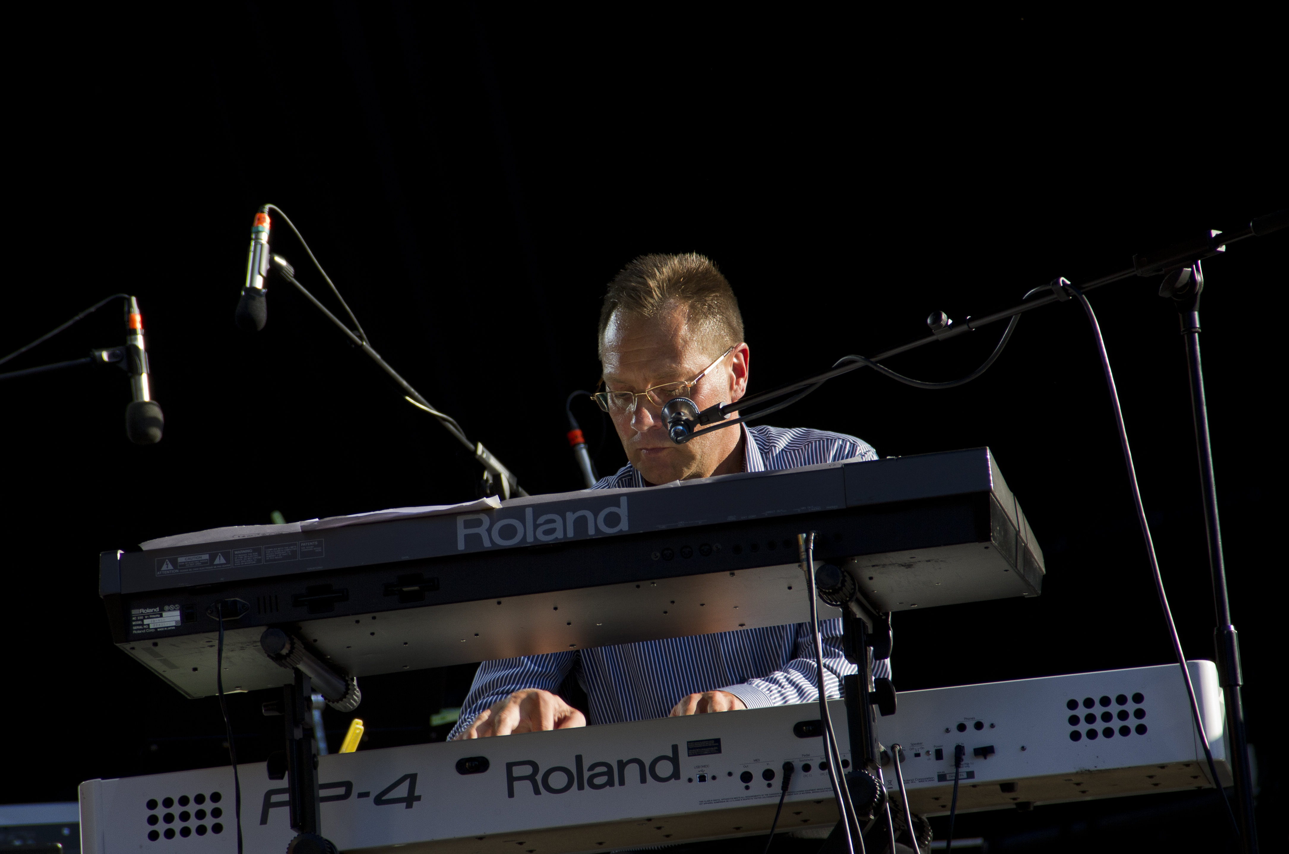 Jussi Halme esiintymässä Tampereen Sorsapuistossa 15. elokuuta 2015.